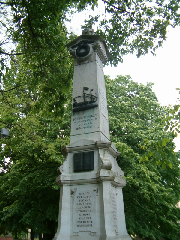 Gályarabok emlékoszlopa (Felállítás 1895. szeptember 21., Gerenday Béla), Hajdú-Bihar megye, Debrecen, Kálvin tér Közvetlenül a Nagytemplom háta mögött